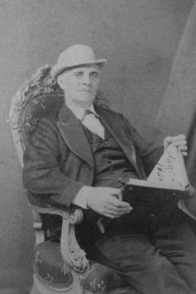 Сергей Дмитриевич Комовский (1798—1880)